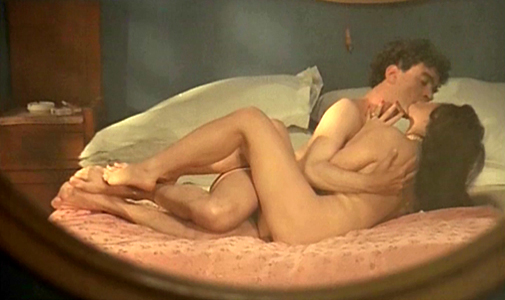 Képkocka „A kulcs” című filmből (Franco Branciaroli és Stefania Sandrelli)